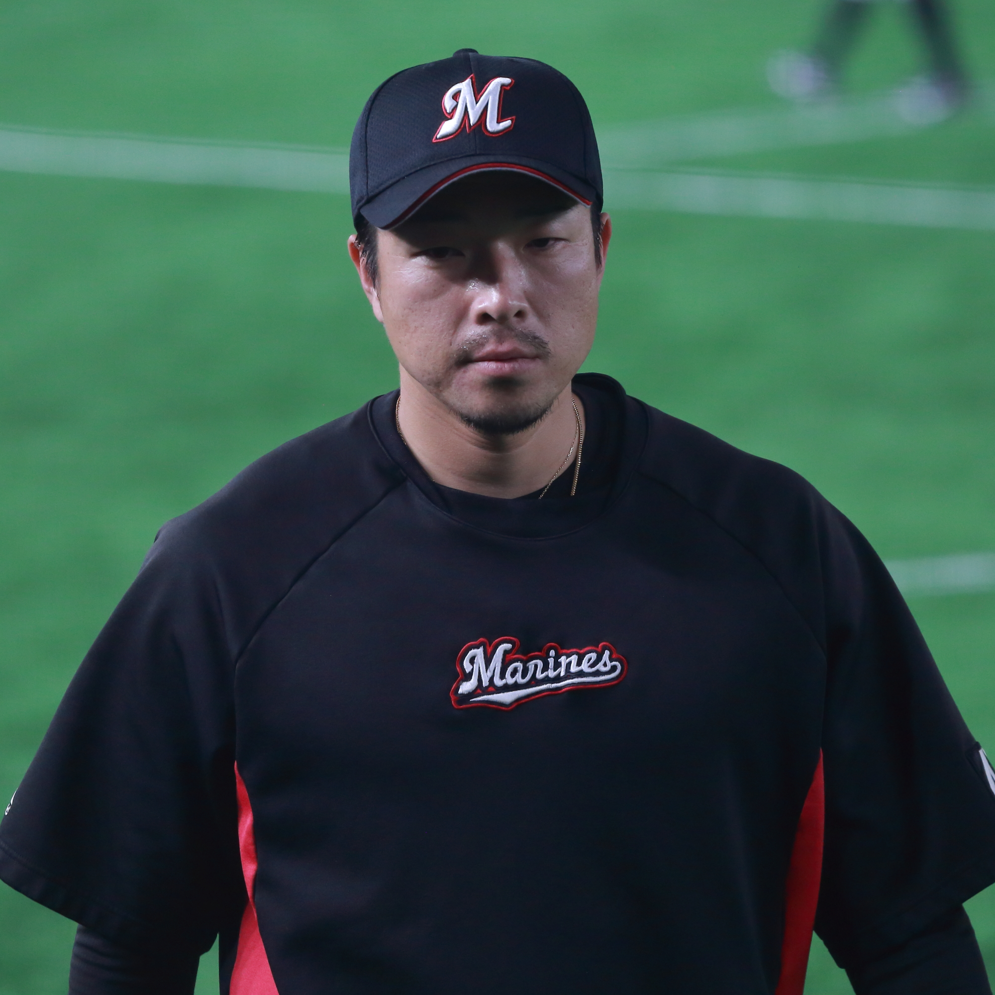 千葉ロッテマリーンズ時代の田中靖洋選手。2019年6月7日に東京ドームで撮影。